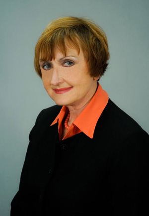 Елена Александровна Баженова, зав. кафедрой русского языка и стилистики Пермского университета.